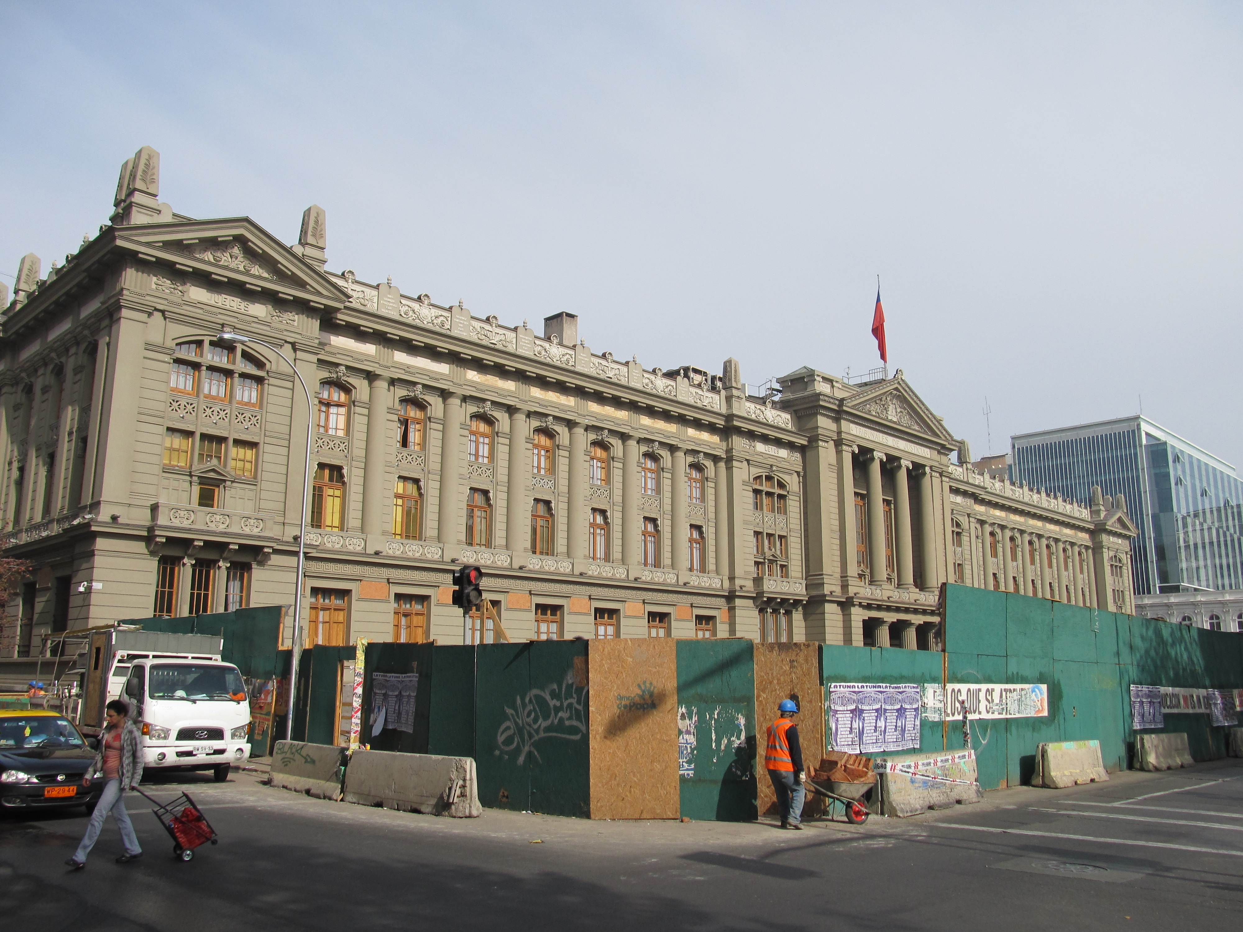 Palacio de los Tribunales de Justicia This is a photo of a national monument in Chile: 828